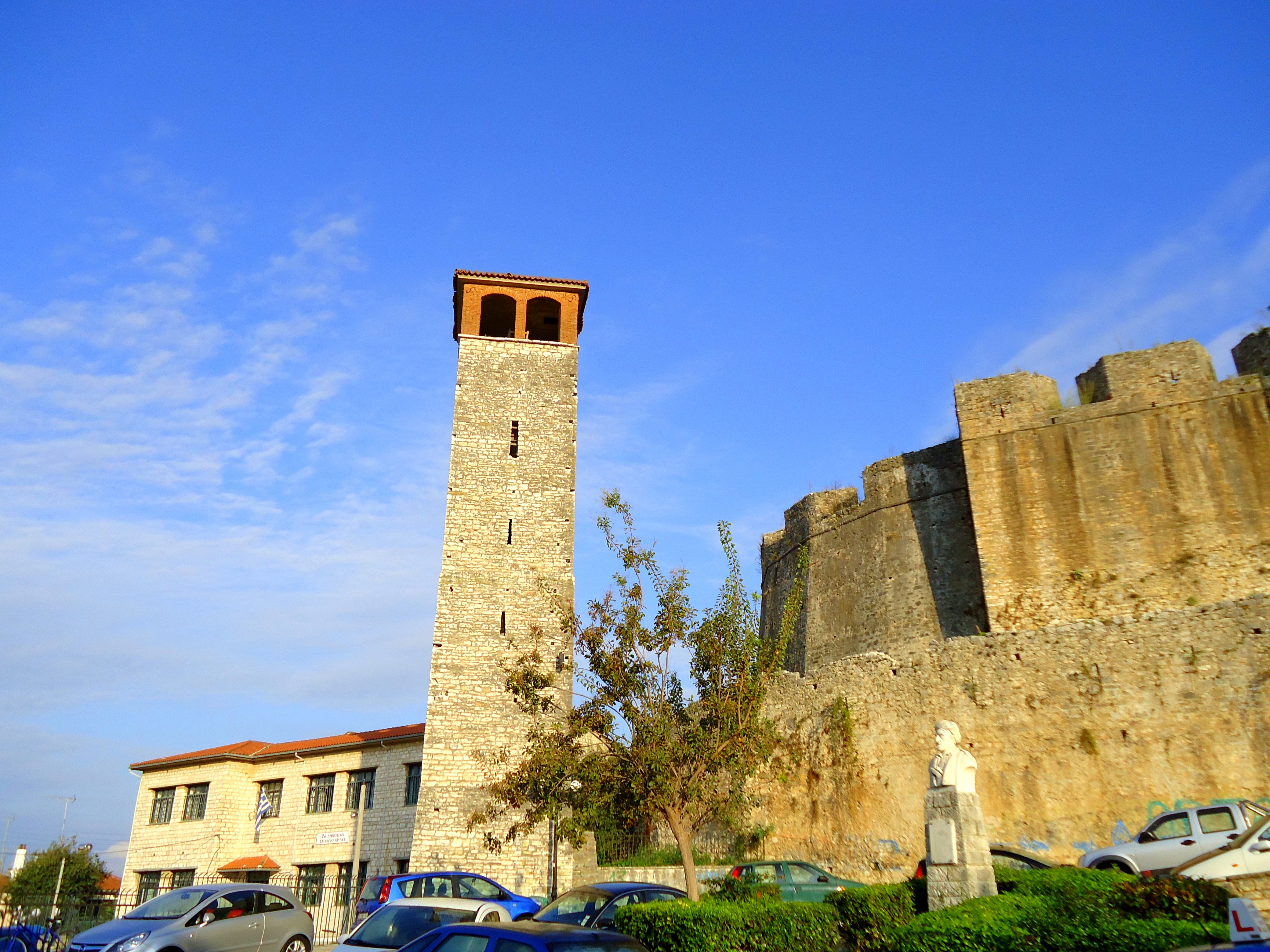 Ο πύργος του ρολογιού και το Κάστρο της Άρτας.